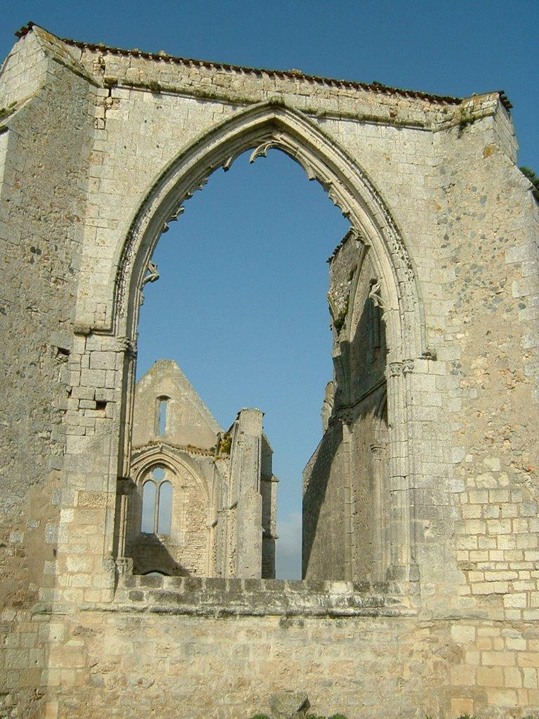 Abbaye Notre Dame de Ré dite des Châteliers : baie béante du choeur (La Flotte, Ile de Ré, Charente Maritime, France)